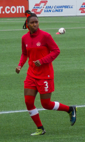 Kadeisha Buchanan (3)